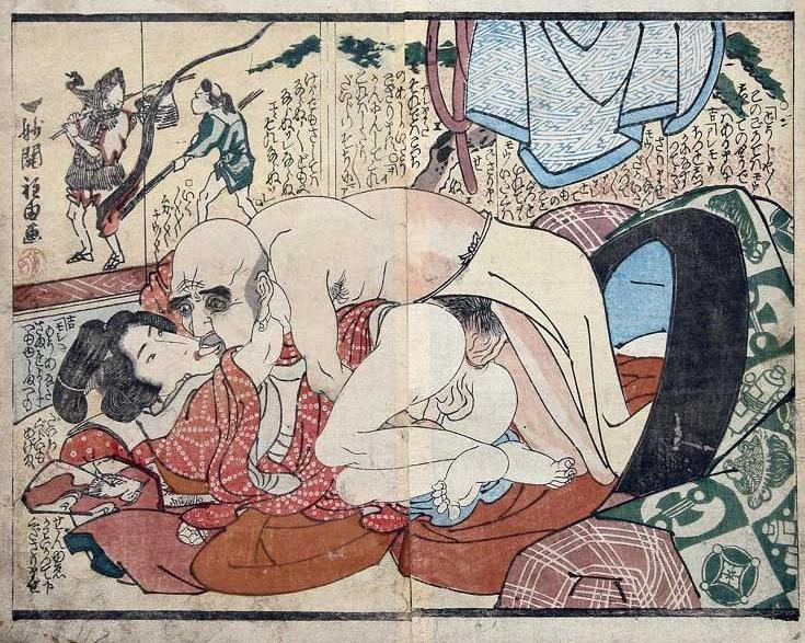 Old Bhuddist